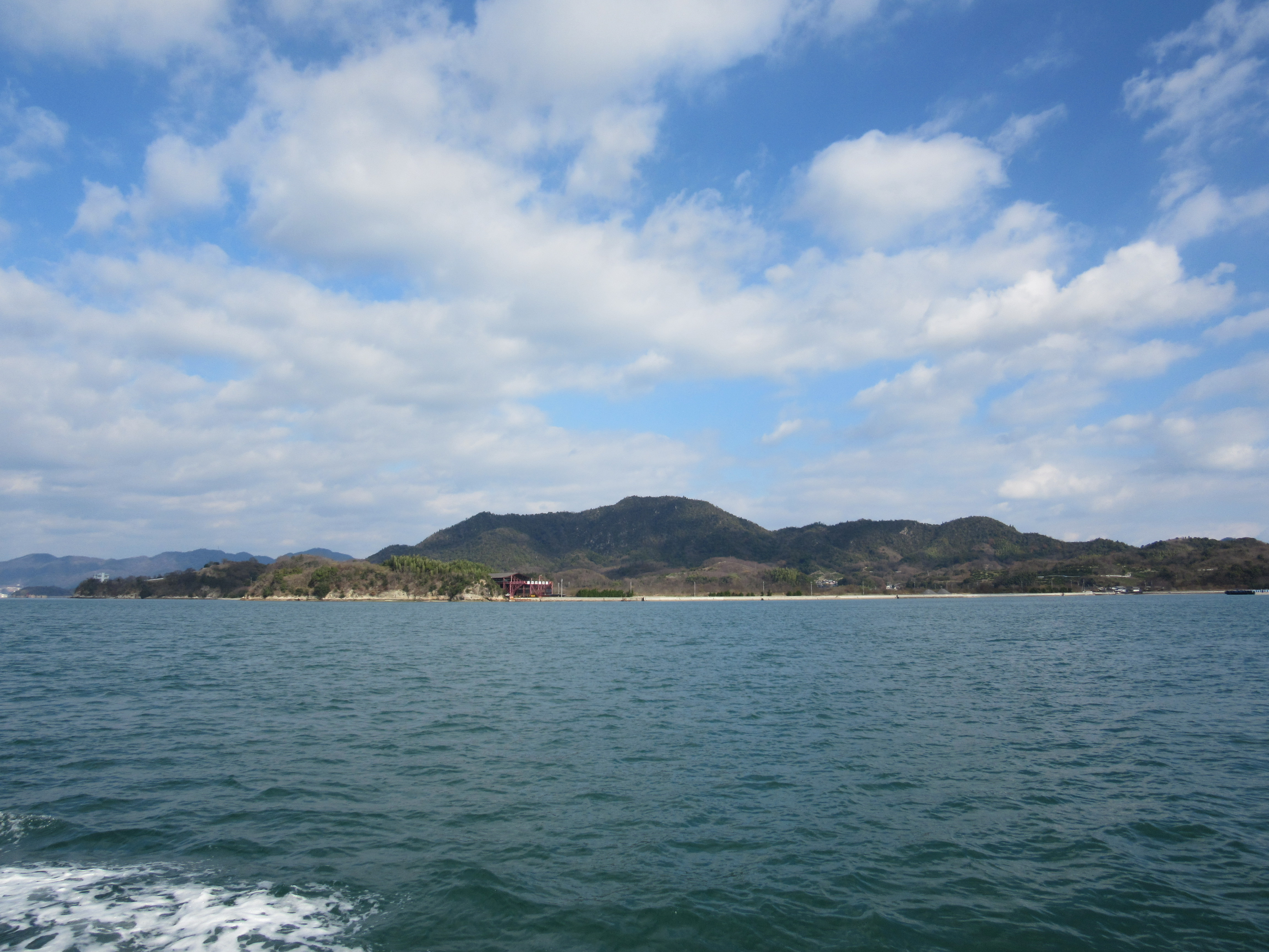 三原市・佐木島西岸